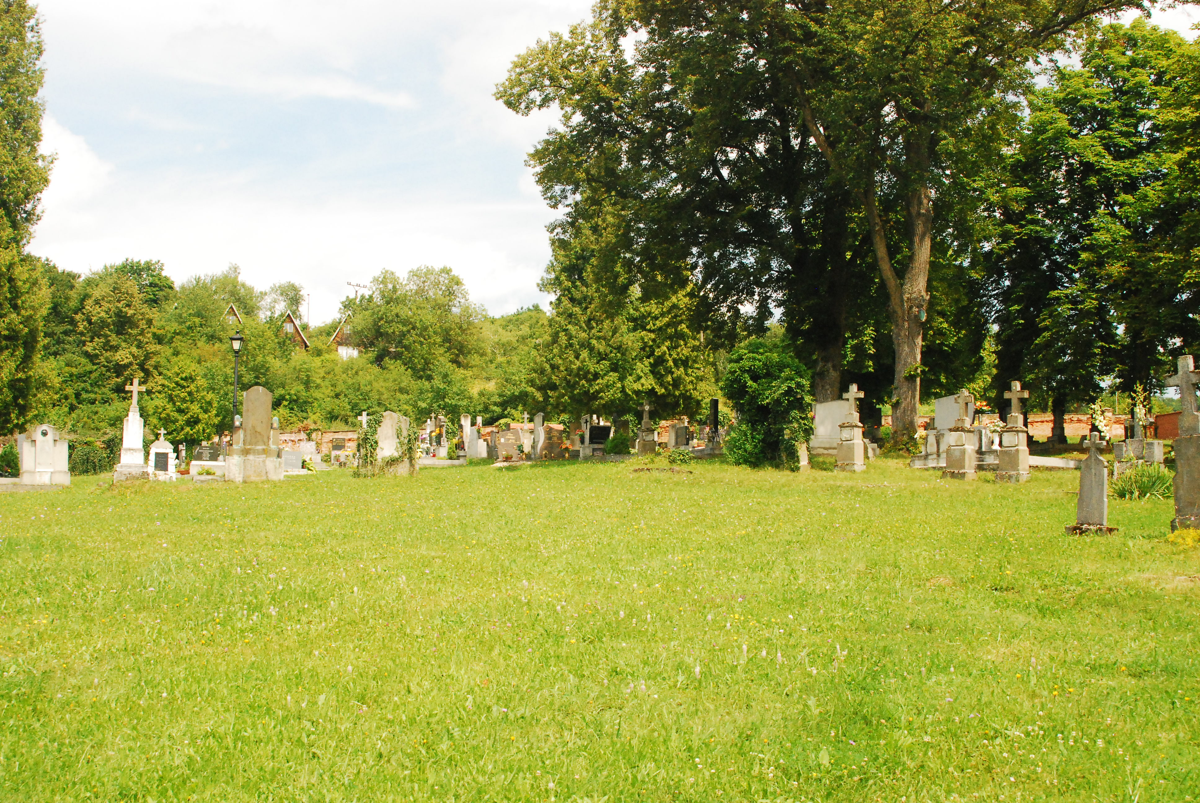 Friedhof von Vranov nad Dyjí/Frain an der Thaya in Südmähren